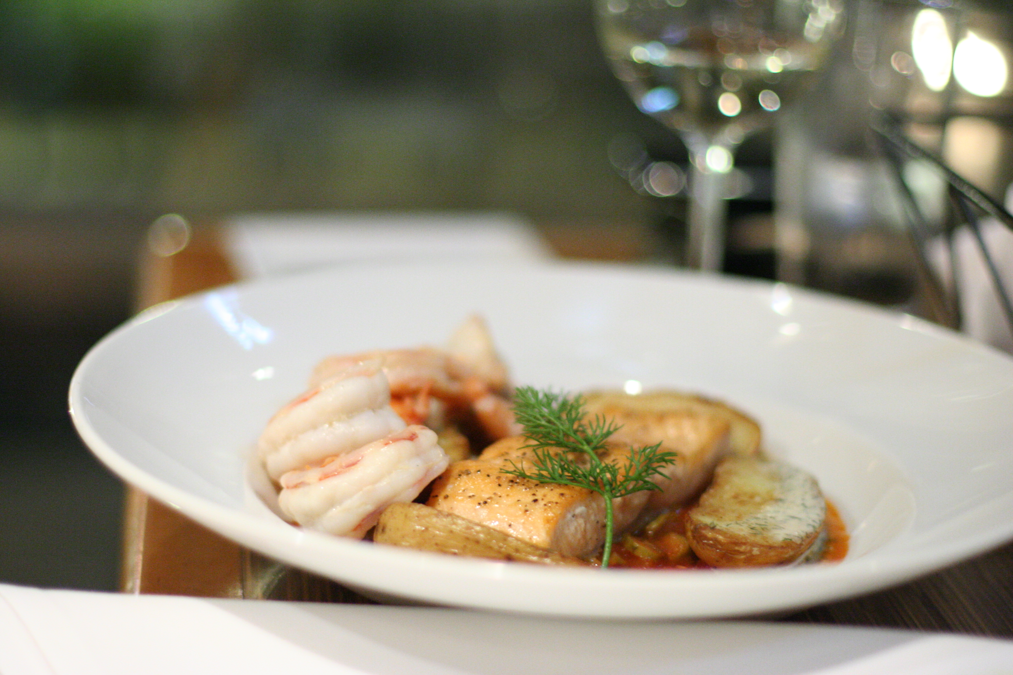 from Lure restaurant in Victoria, BC, Canada. Phone 250-360-LURE